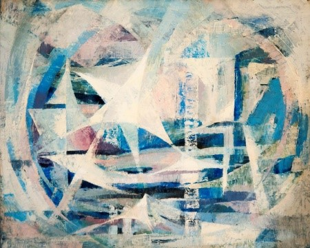 A TÉL (80x100 cm, olaj, vászon) Lemerevíti, állandósítja a maga szakaszát. Formajegyeiben a kristályosság, az ünnepélyesség, a nyugalom a jellemző forma, a hóhullás, a jegesedés, a csillagforma és az ezekhez tartozó hideg kékek, lilás rózsaszínek, fehérek – szinte a fázás érzetét váltják ki.